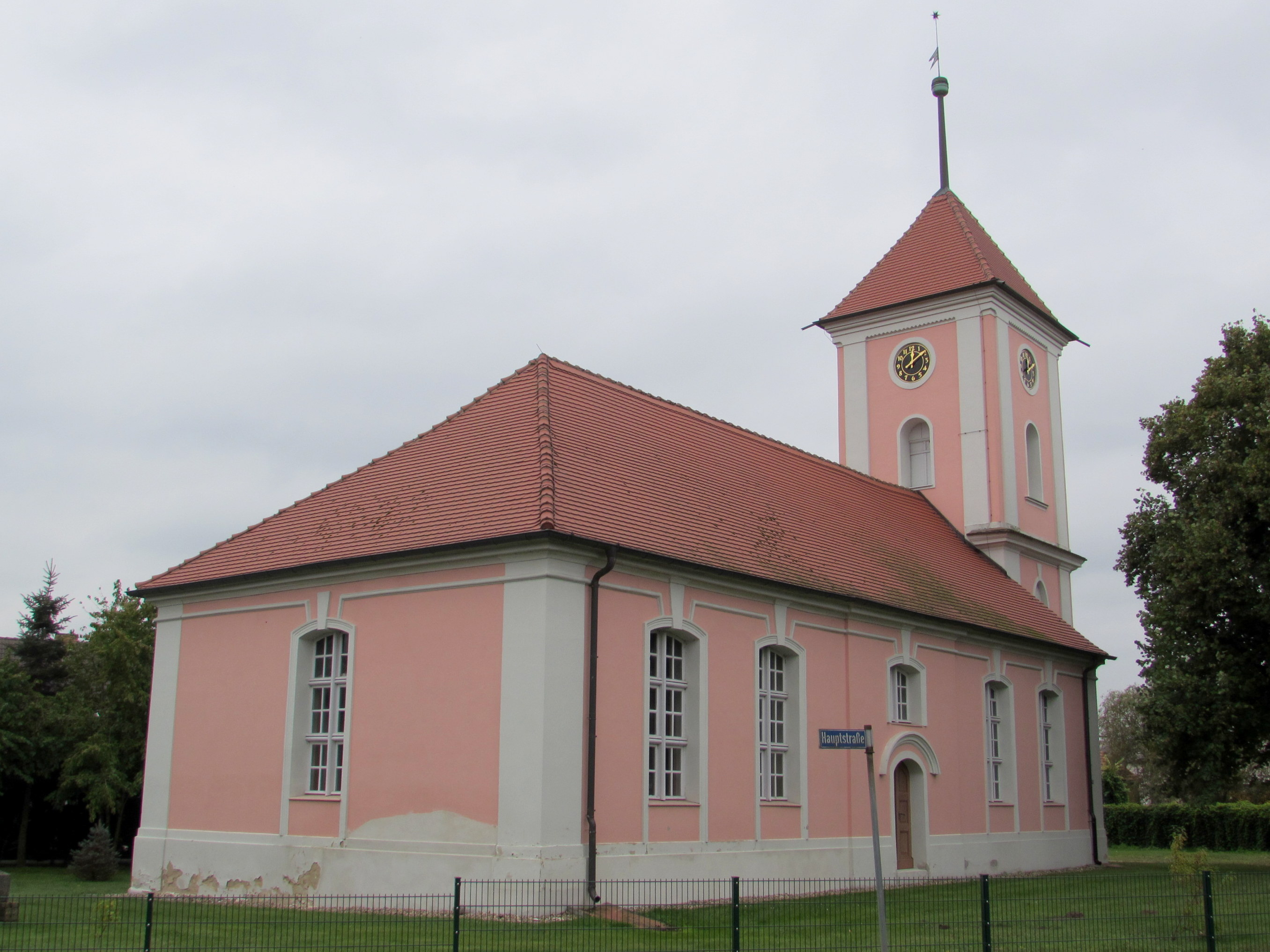 kirche weseram